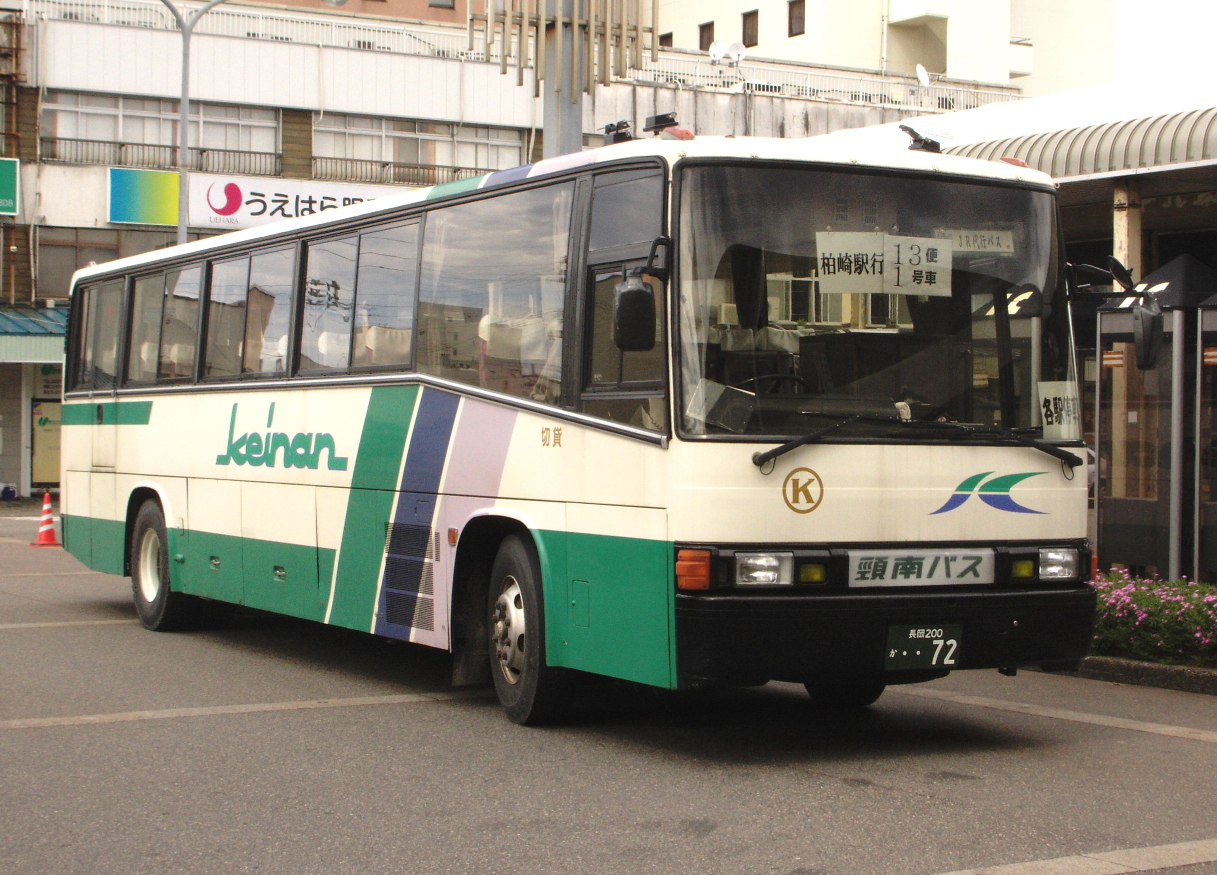 頚南バス